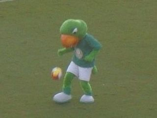 Porco, mascote oficial do Palmeiras